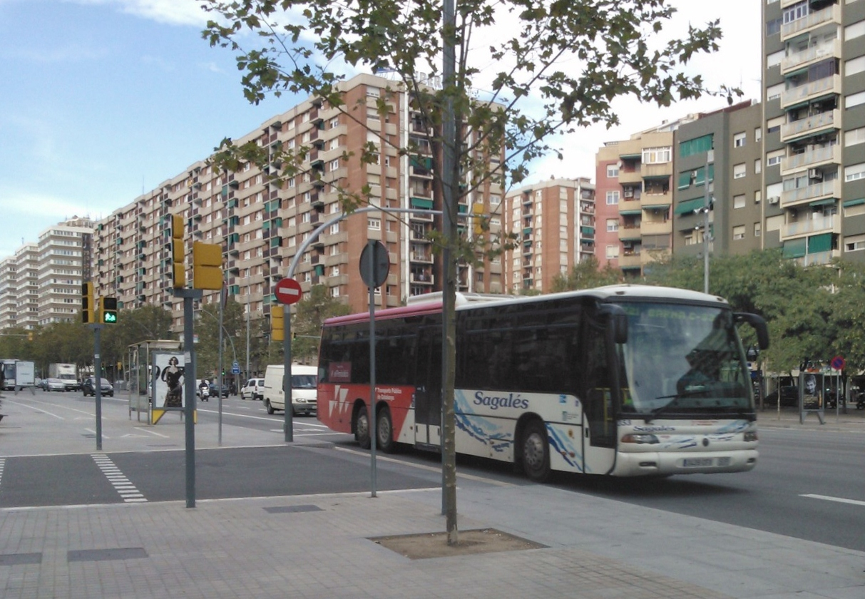 Autobús interurbà/urba a Barcelona